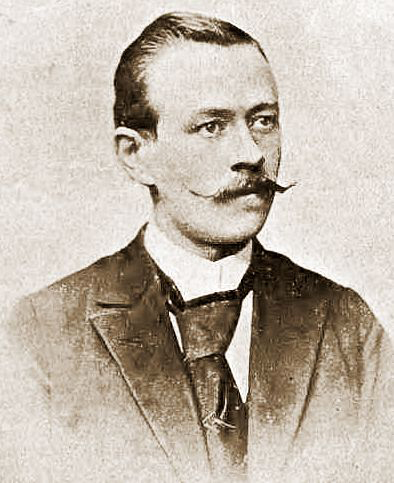 Jan Stapiński (-1898)